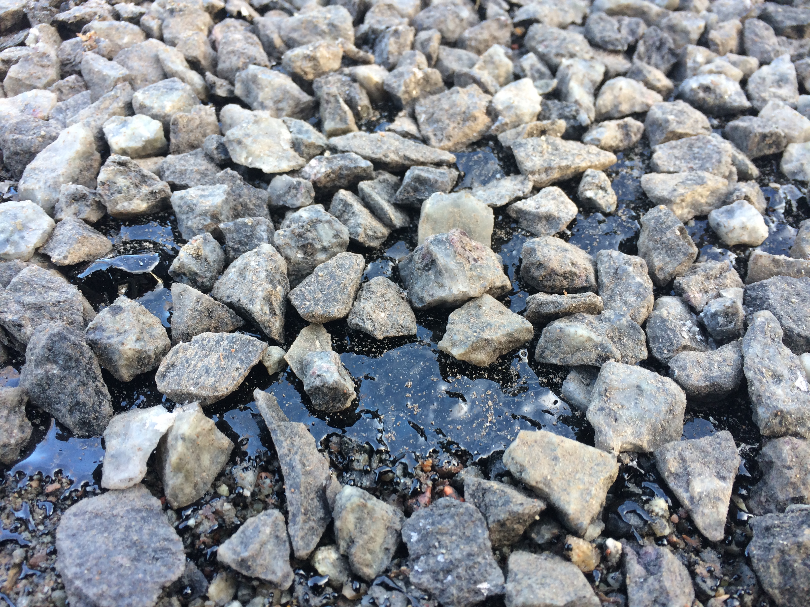 Utlagt ytskikt av typ Y1